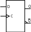 Schéma d'une bascule D